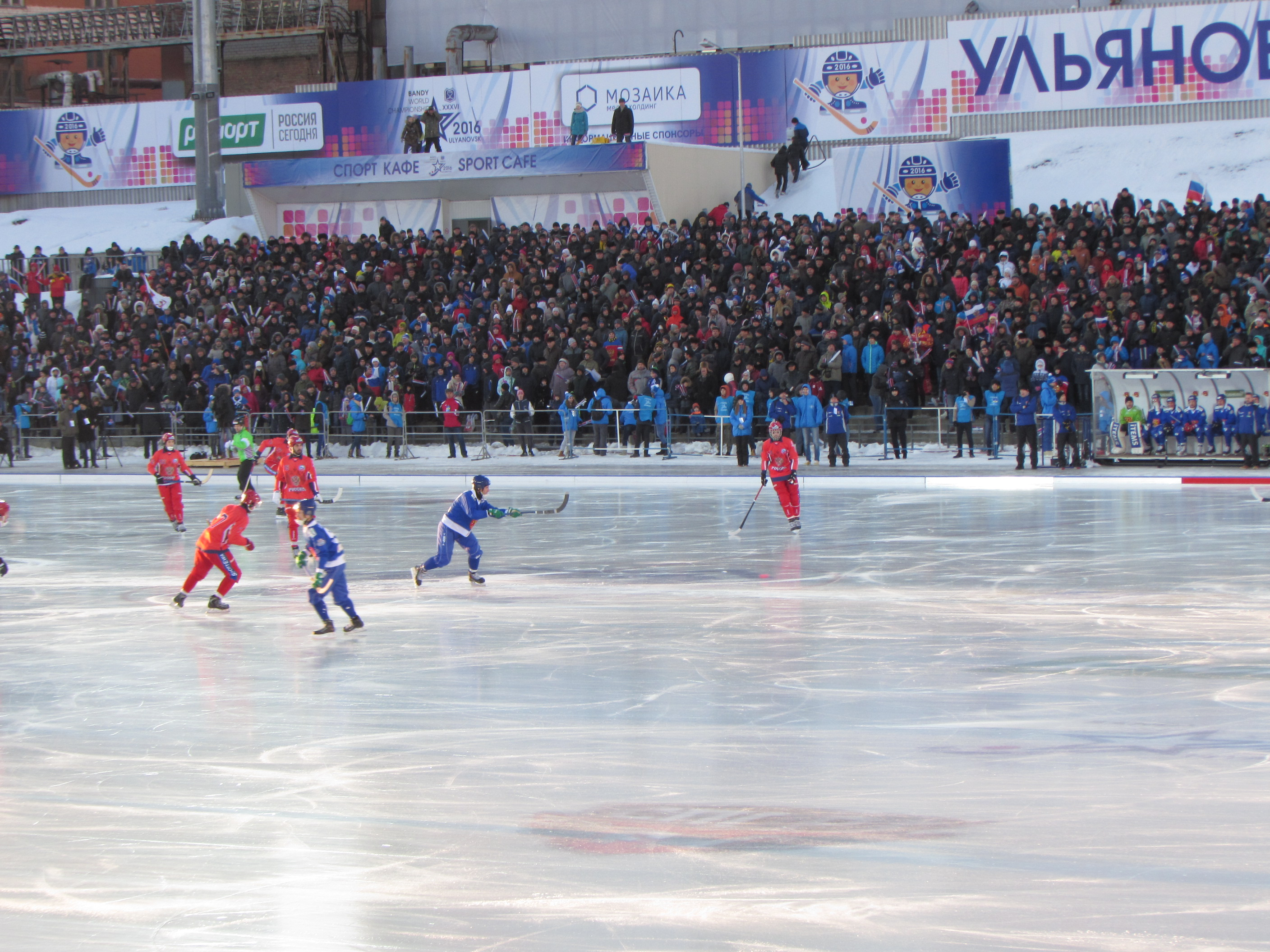 Фінал Росія – Фінляндія 2016 р.